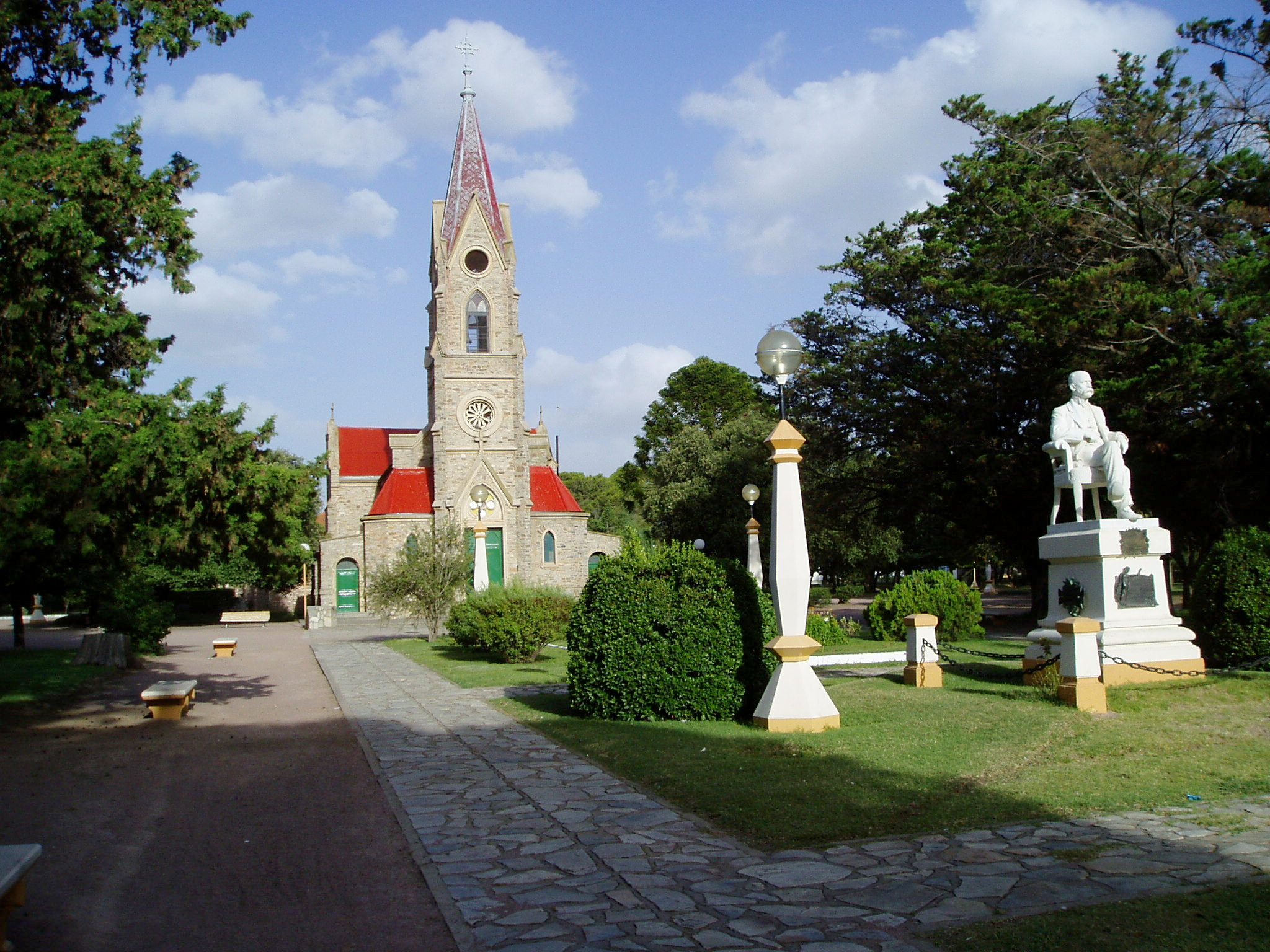 Plaza Ernesto Tornquist en la localidad de Tornquist, Prov. de Buenos Aires, Argentina.